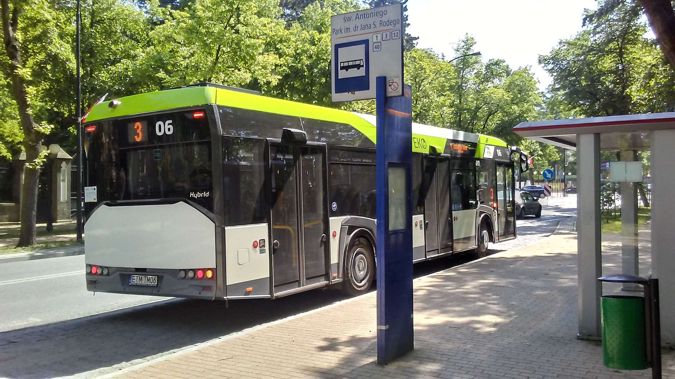 Jeden z 25ciu autobusów hybrydowych Solaris Urbino 12 zakupionych przez PiS za dotacje dla tomaszowskiego MZK. Przystanek św. Antoniego park Rodego